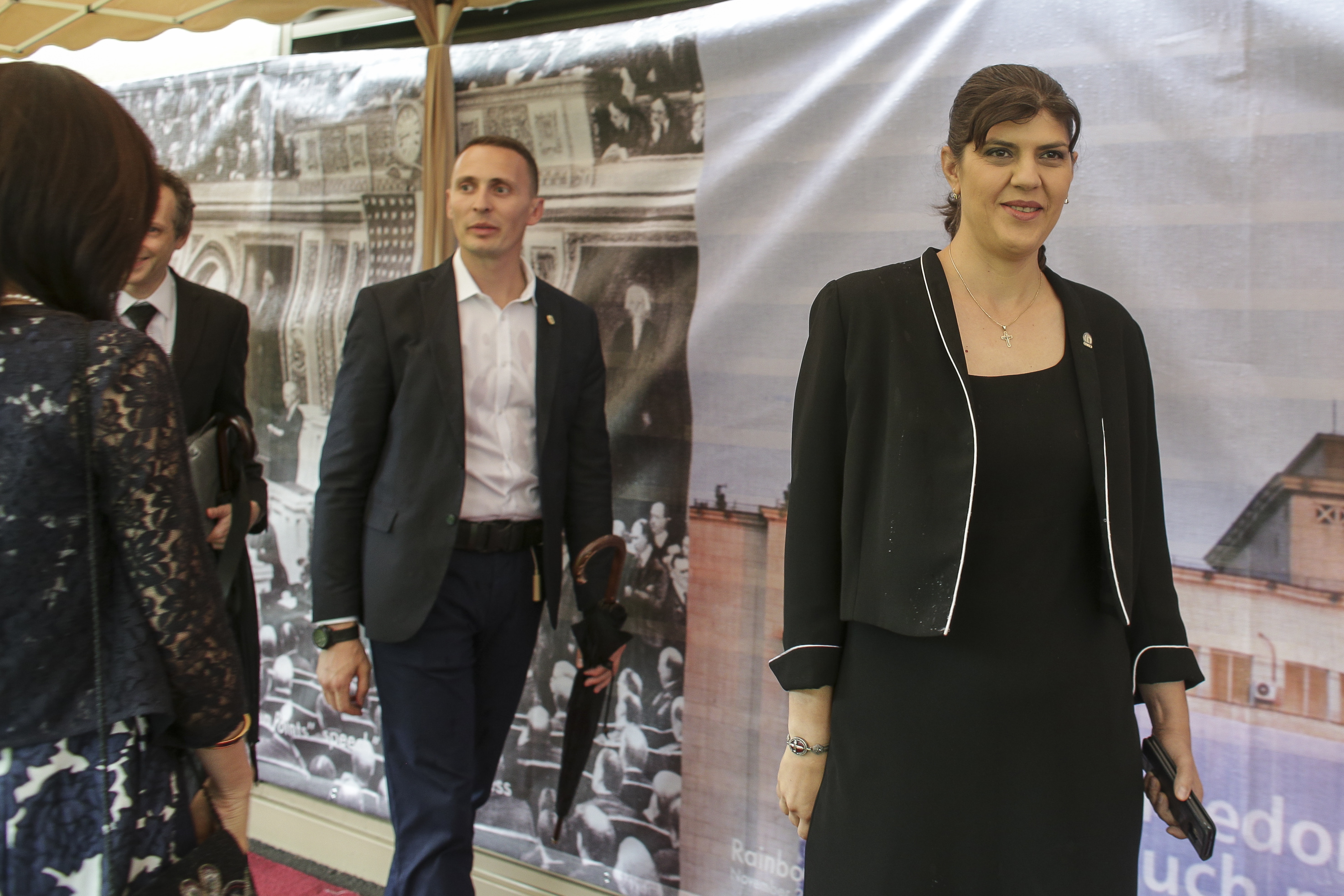 100 Years Of Friendship. A fost tema recepţiei de Ziua Independentei, când am sărbătorit împreună independenţa Americii, centenarul unităţii României şi prietenia dintre SUA şi România. Am avut lângă noi distinşi oaspeţi, prieteni dragi şi curajoşi, care nu s-au speriat de furtună şi au rămas alături de noi, pentru ca în final să fim binecuvântaţi cu un curcubeu superb. Mulţumim, România! 🇷🇴🇺🇸❤️ Octav Ganea / Inquam Photos --- 100YearsOfFriendship #July4th #IndependenceDay #ZiuaIndependentei #Bucharest #Bucuresti #Romania